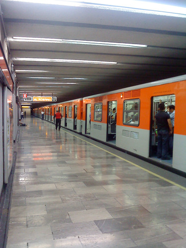 Lo he visto en esa linea